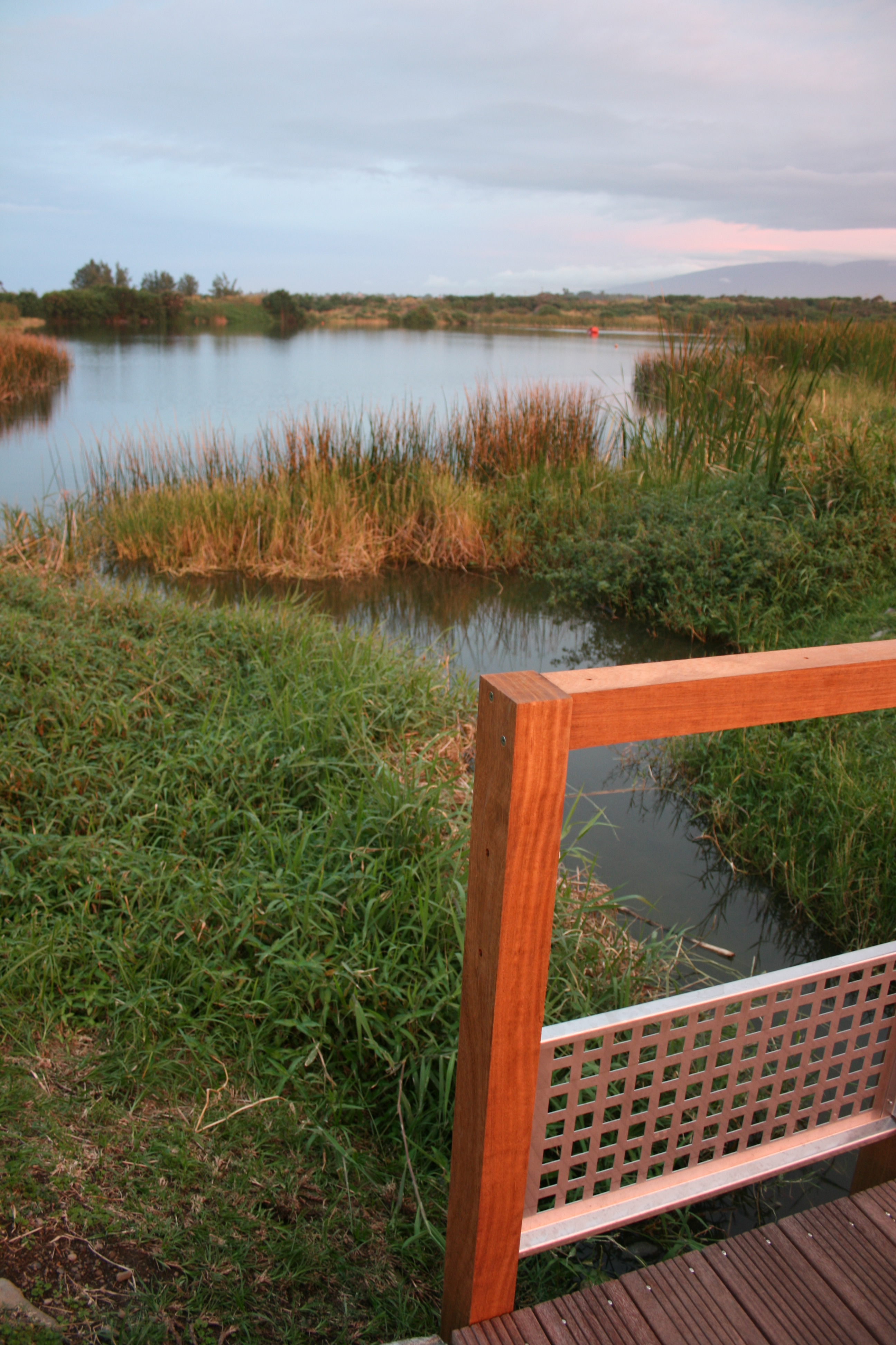 Un petit pont en bois face à l'étang côtier du parc du Colosse, à Saint-André de la Réunion